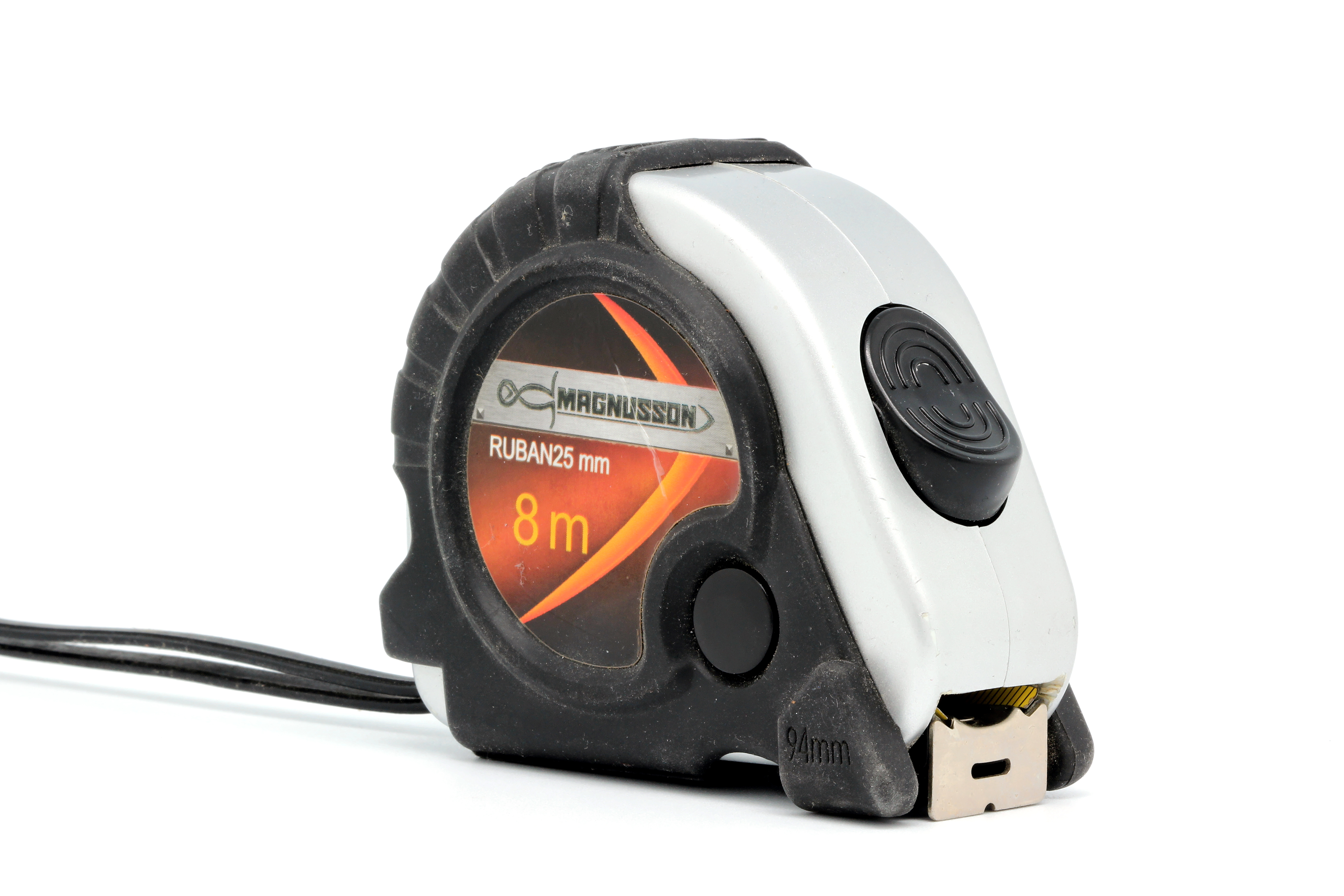 Magnusson ruban 8 m 25 mm